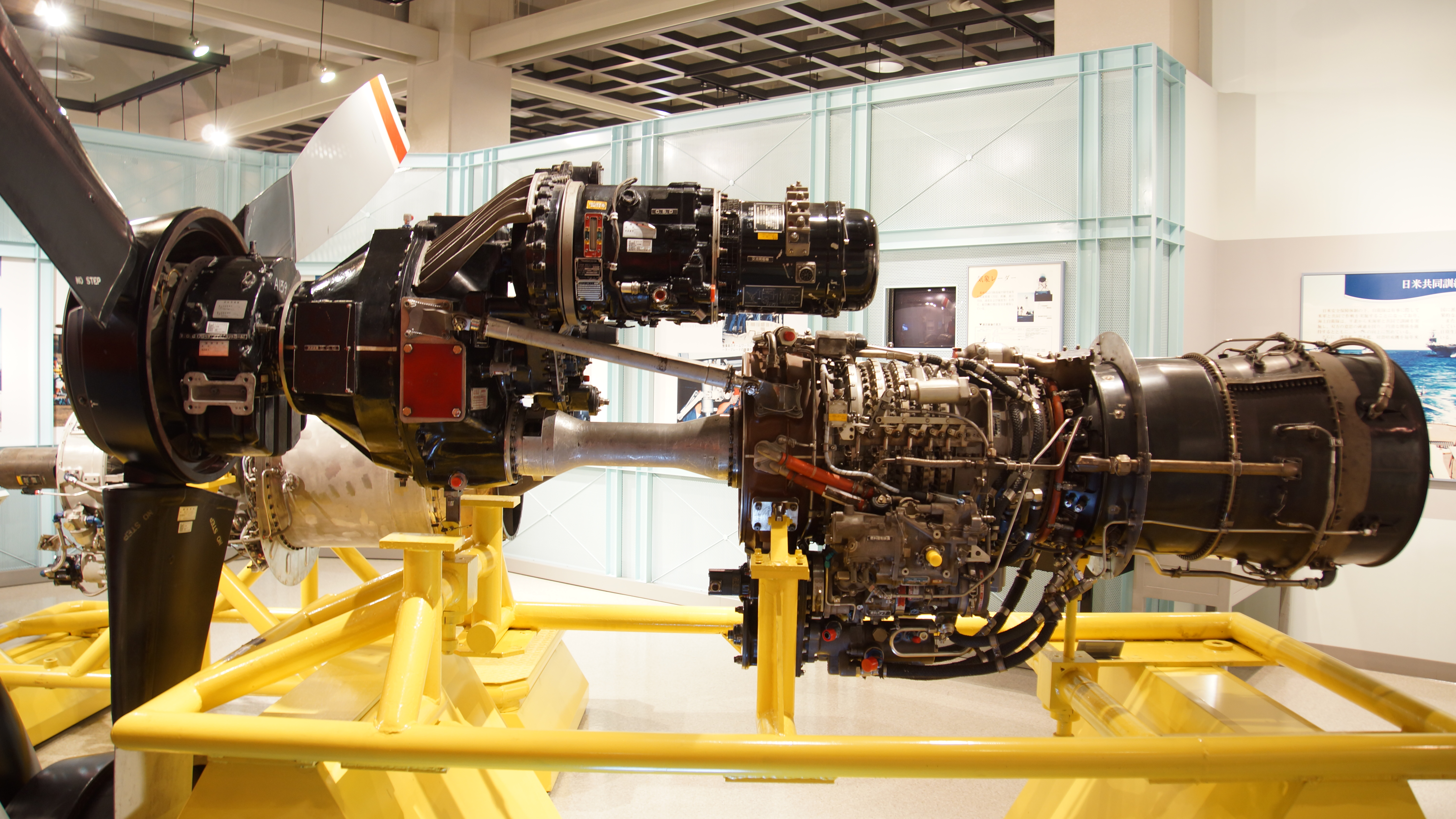 海上自衛隊 P-2J用T64-IHI-10Eターボプロップエンジン 左側面。 2017年4月29日 海上自衛隊鹿屋航空基地史料館内にて。